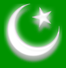 Green Islam symbol